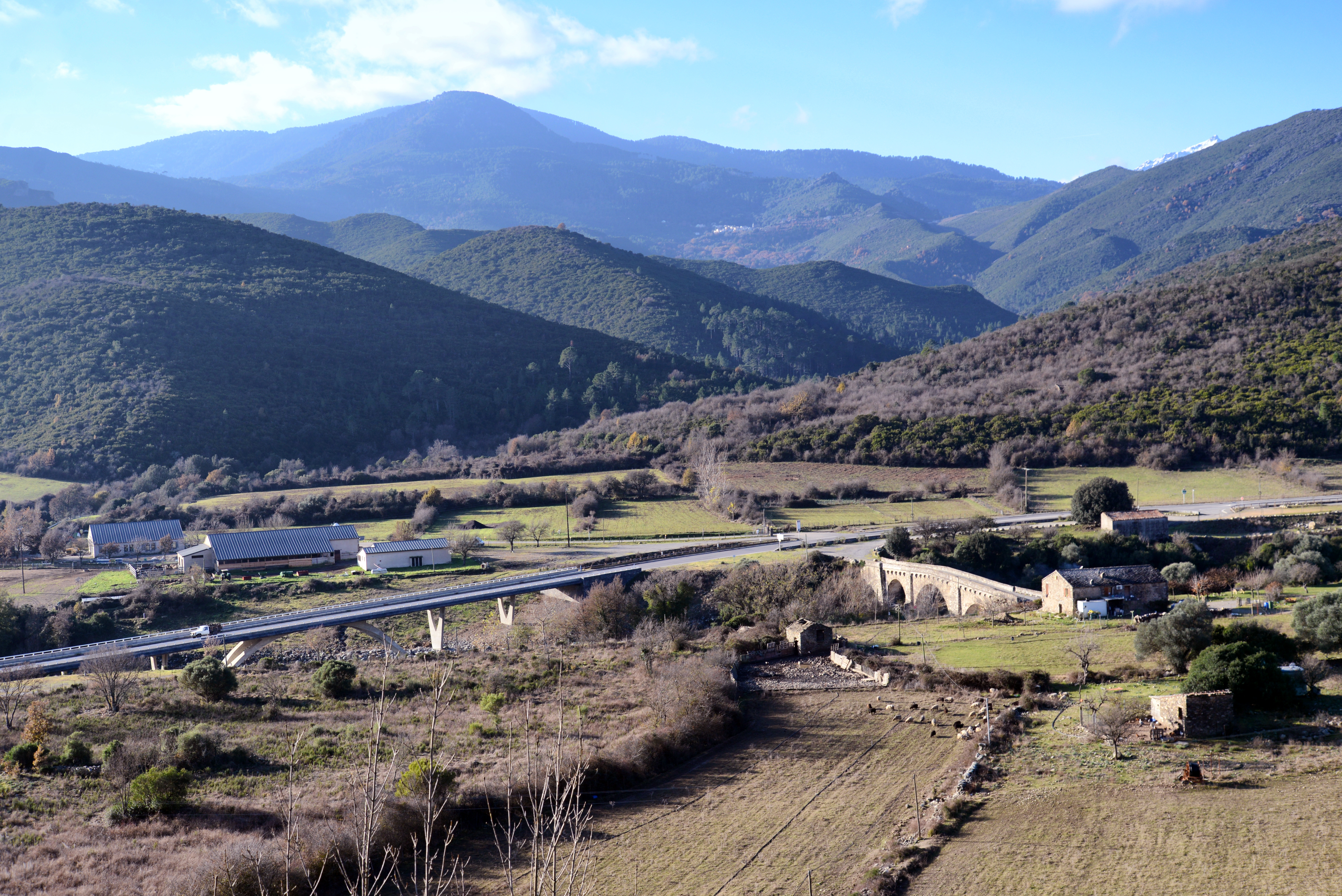 Altiani (Haute-Corse) : le nouveau pont de la Route RT 50 (anciennement nationale 200) sur le Tavignano. On aperçoit sur la droite le vieux pont génois (Pont'à u large).